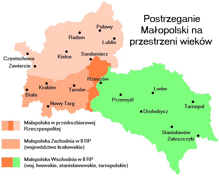 Zmiany granic Małopolski na przestrzeni wieków